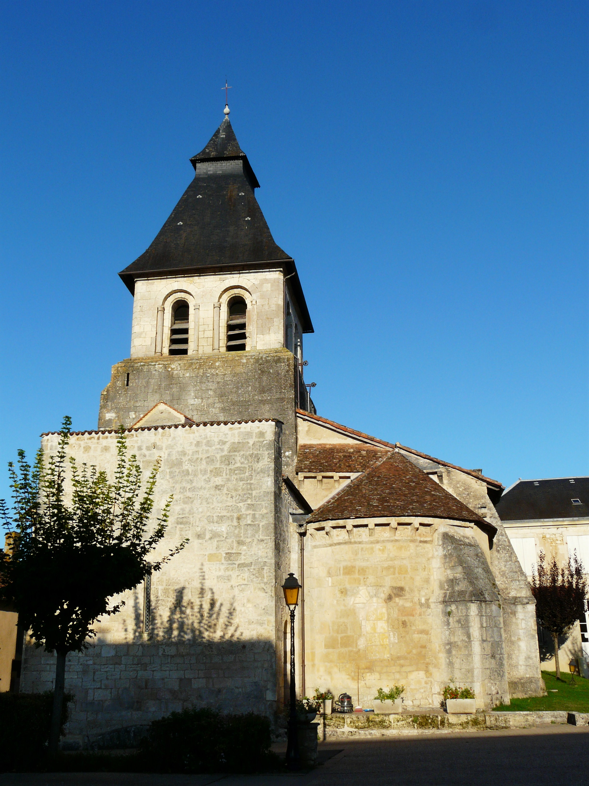 L'église Saint-Germain d'Auxerre, Sorges, Dordogne, France Object location45° 18′ 25.1″ N, 0° 52′ 20″ E